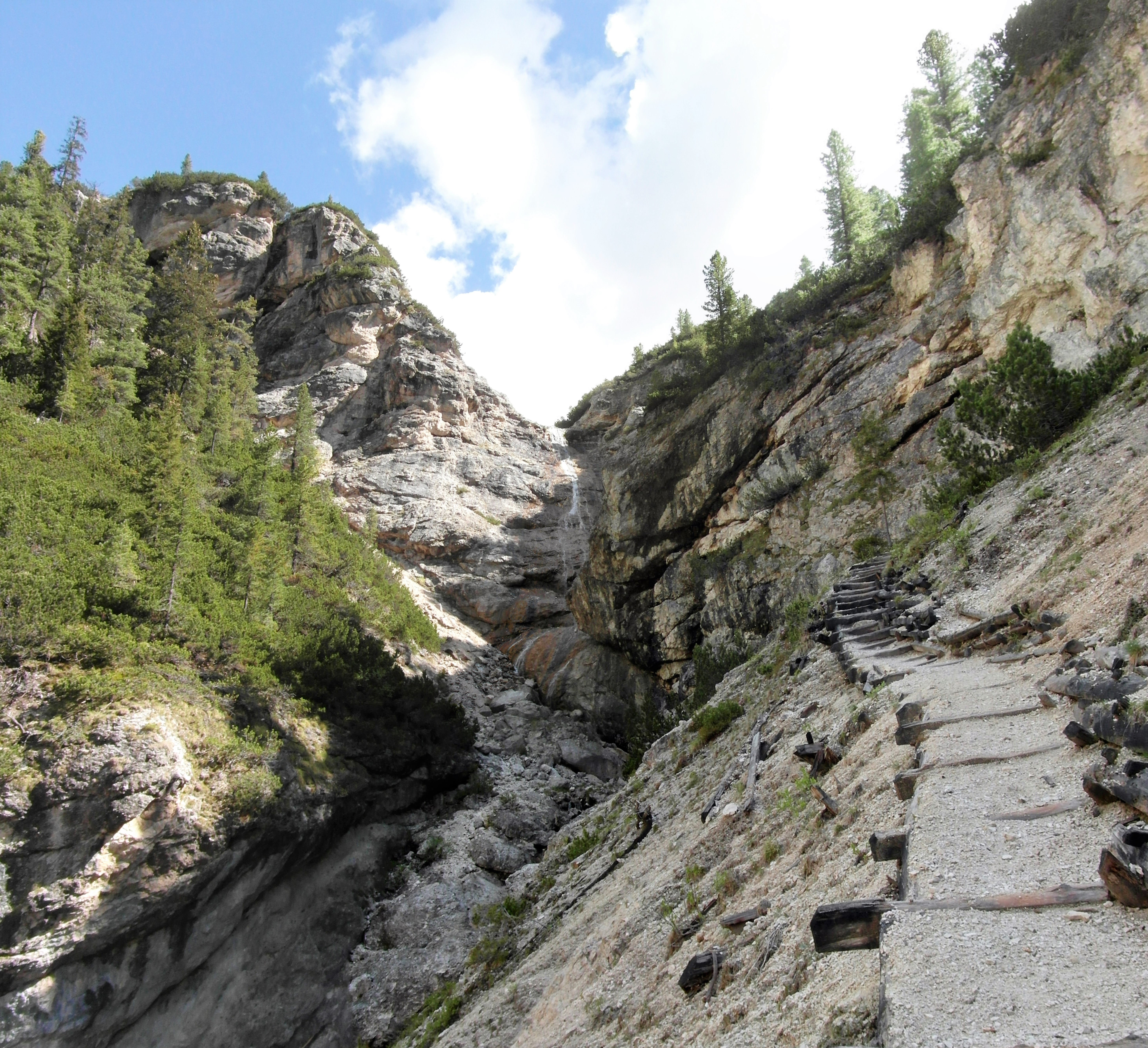 Prato Piazza